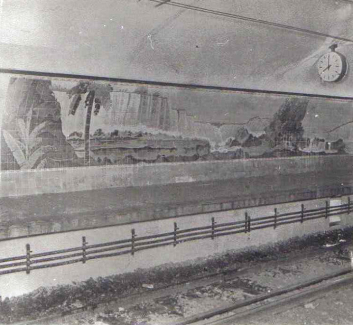 estación San José Vieja, linea E